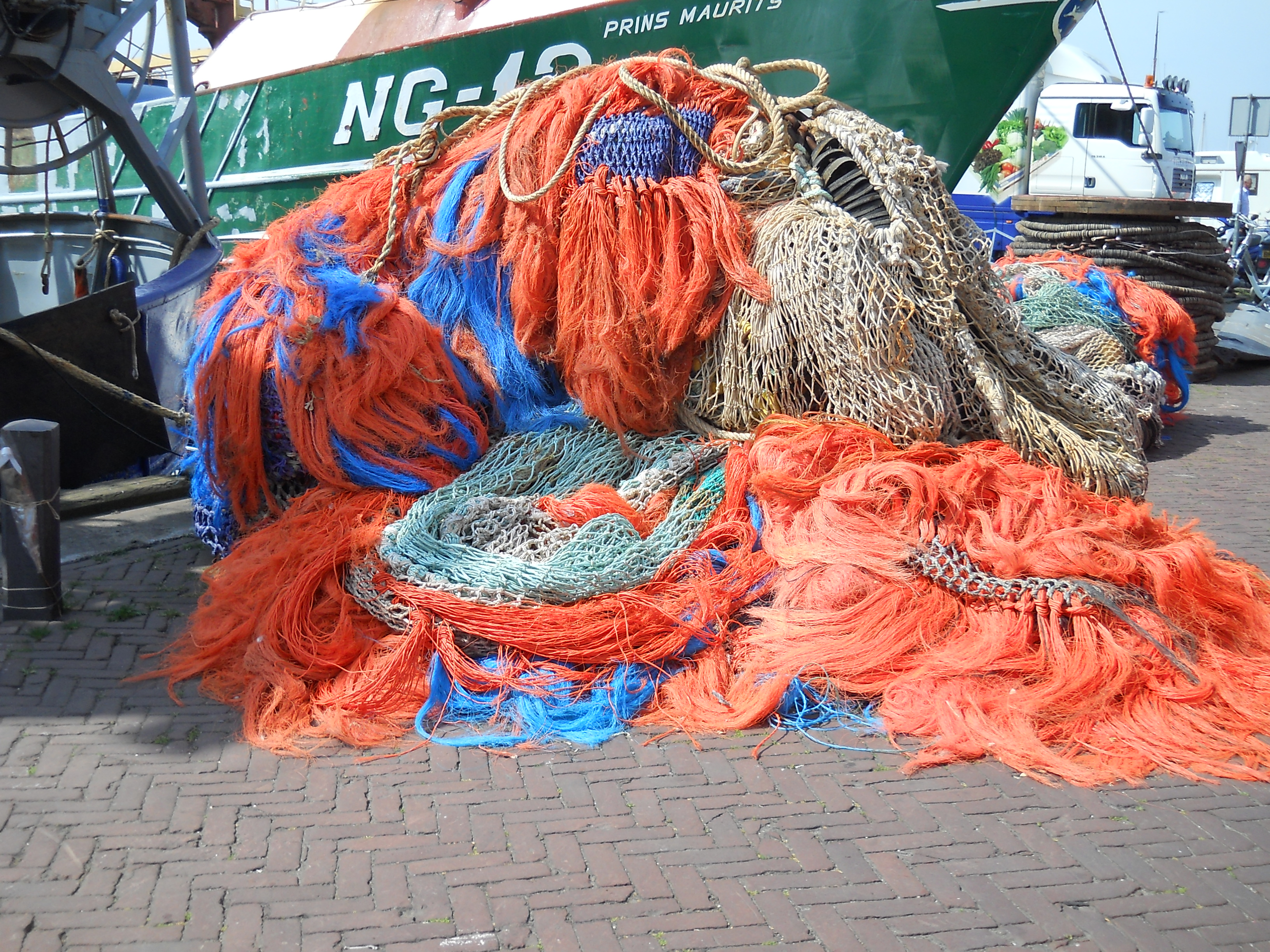 Haven Urk- visnetten